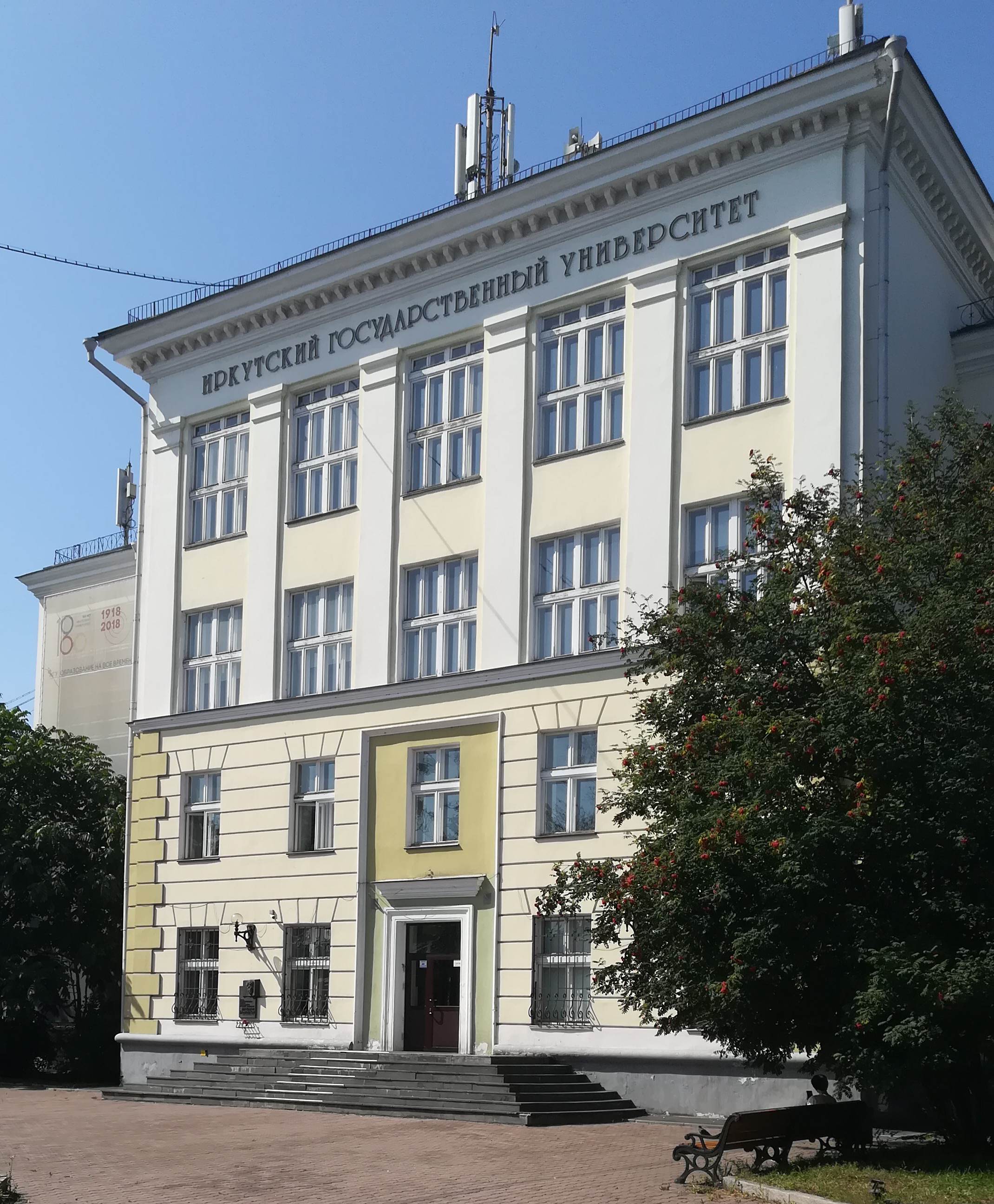 Главный (№ 2) корпус Иркутского государственного университета